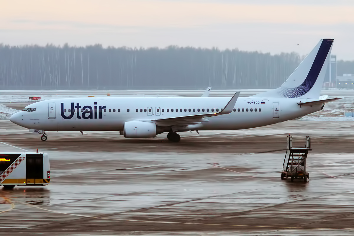 UTair, VQ-BQQ, Boeing 737-8GU